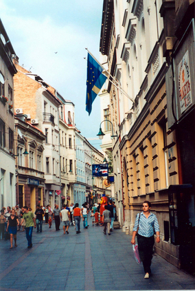 Embassy of Sweden in Ferhadija street in Sarajevo